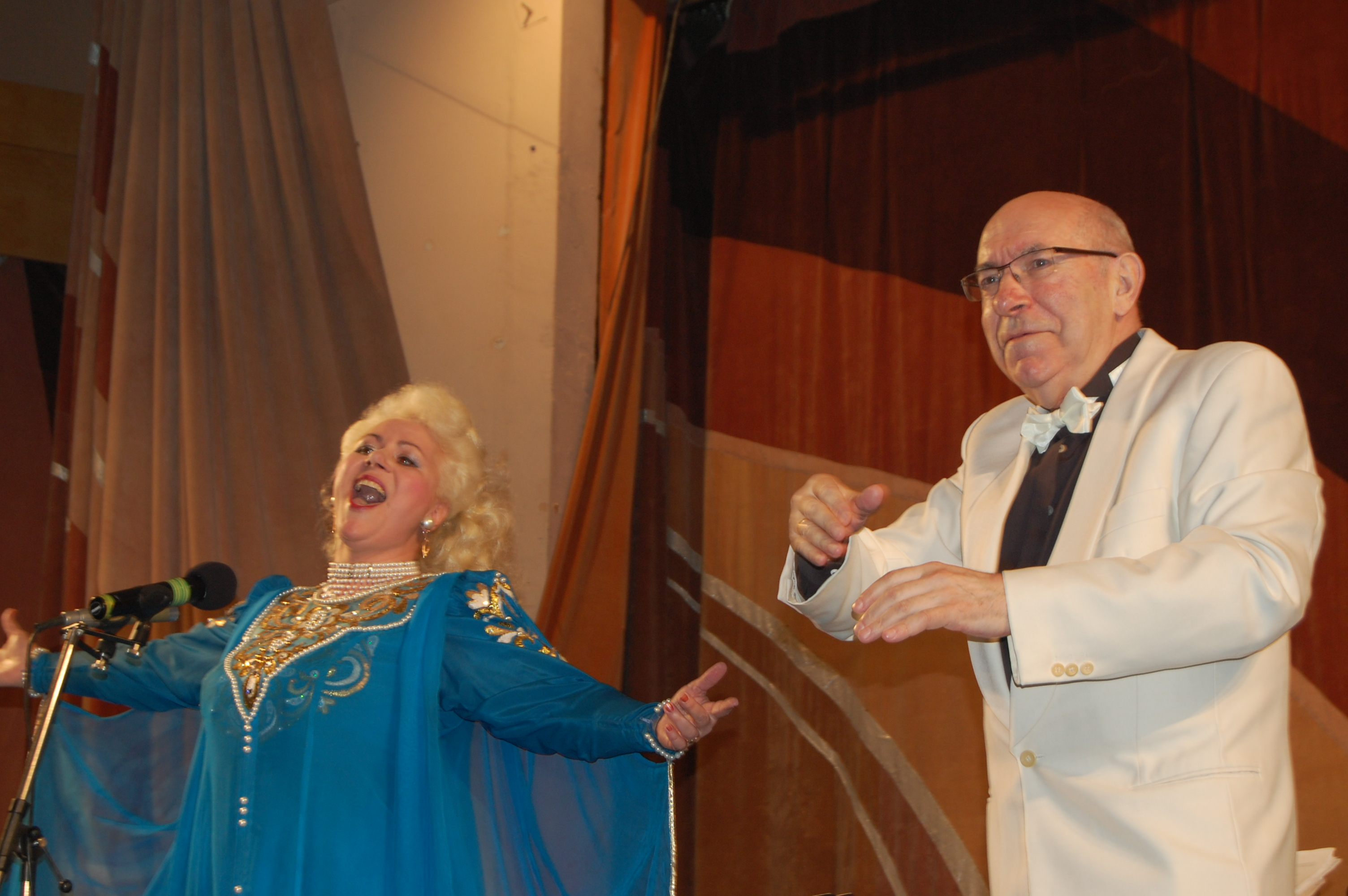 На концерте